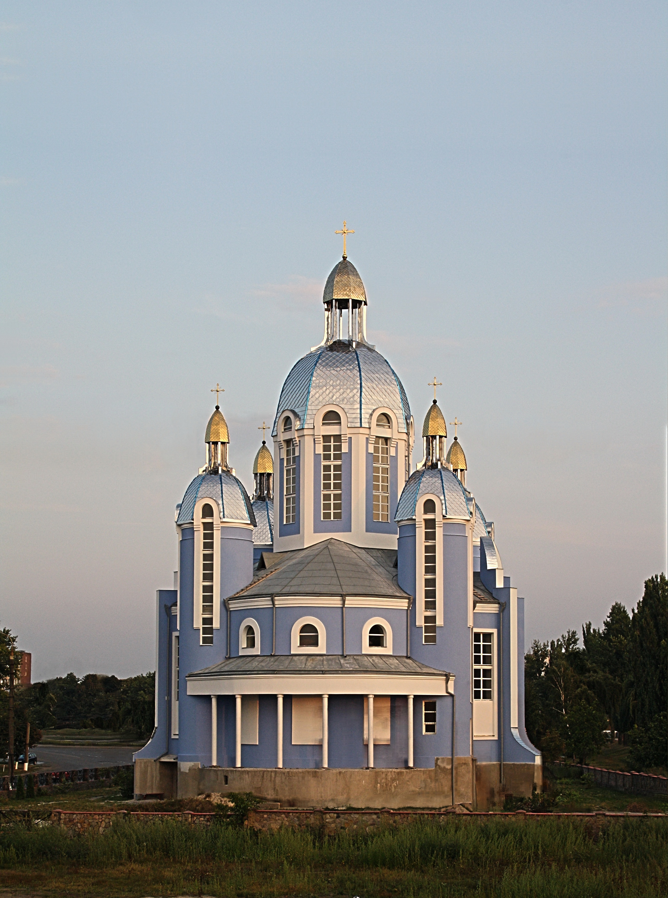 Україна Вінниця, Українська греко-католицька церква